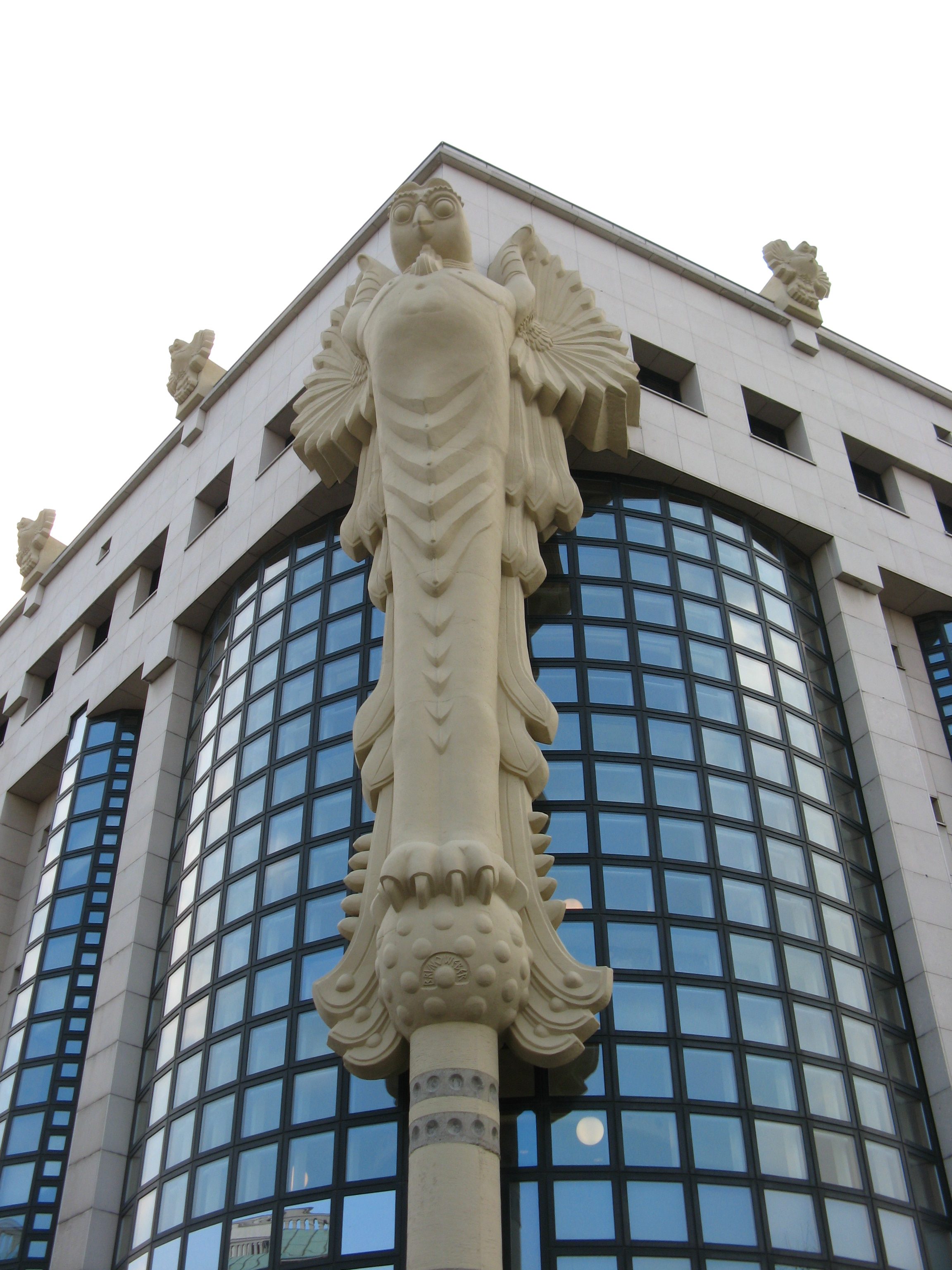 Eulenplastik von Bruno Weber an der Bibliothek der Technischen Universität, Wiedner Hauptstraße 6, Wien-Wieden